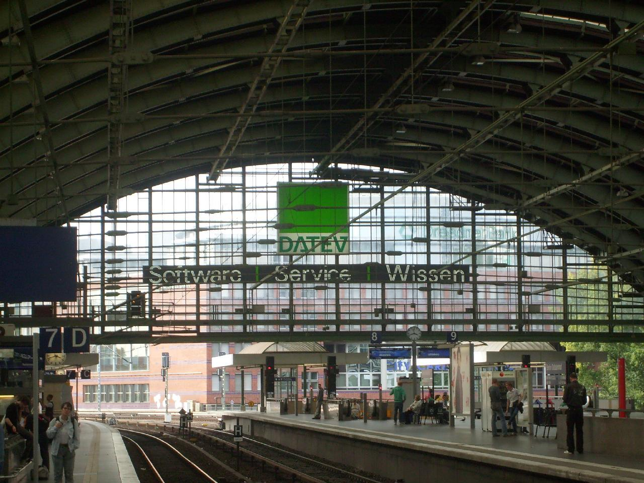 Datev Werbung am Bahnhof